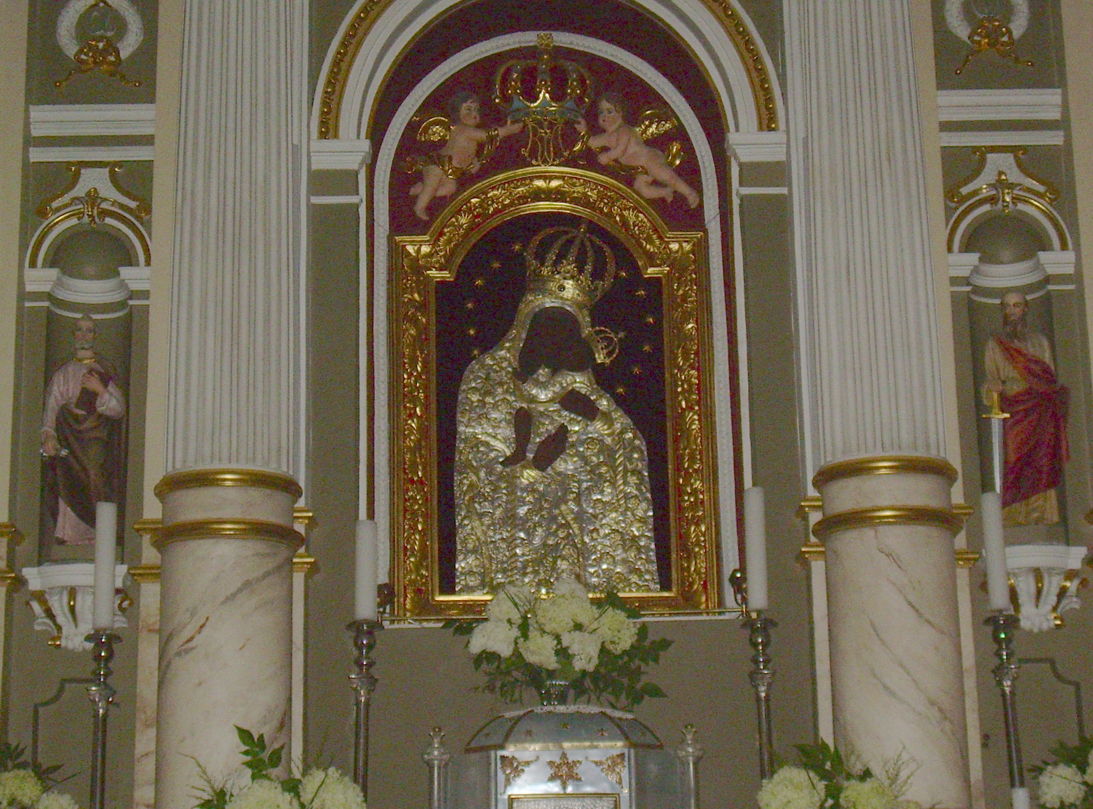 Žemaičių Kalvarijos Švč. Mergelės Marijos Apsilankymo mažoji bazilika